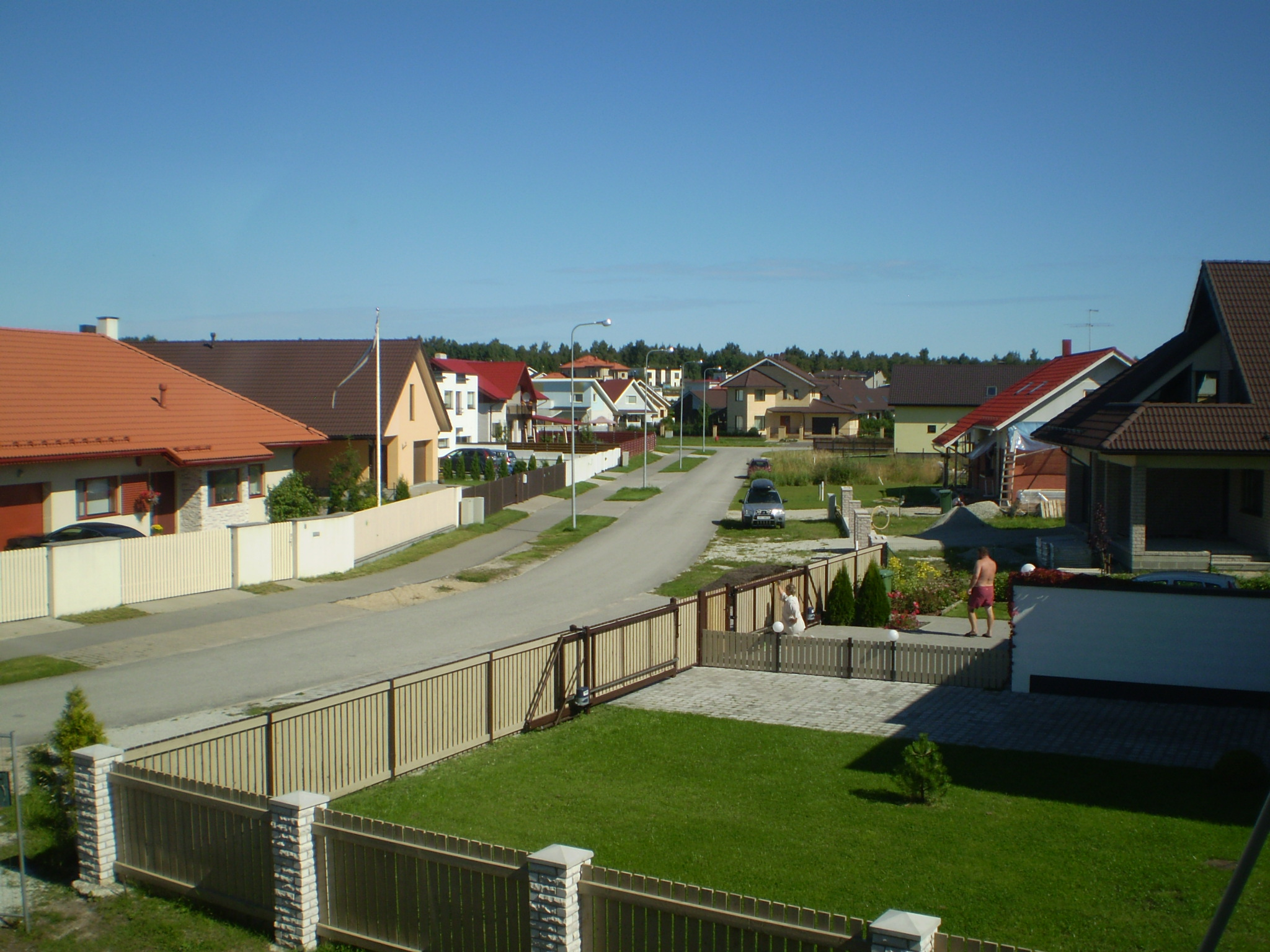 Rangu tänav